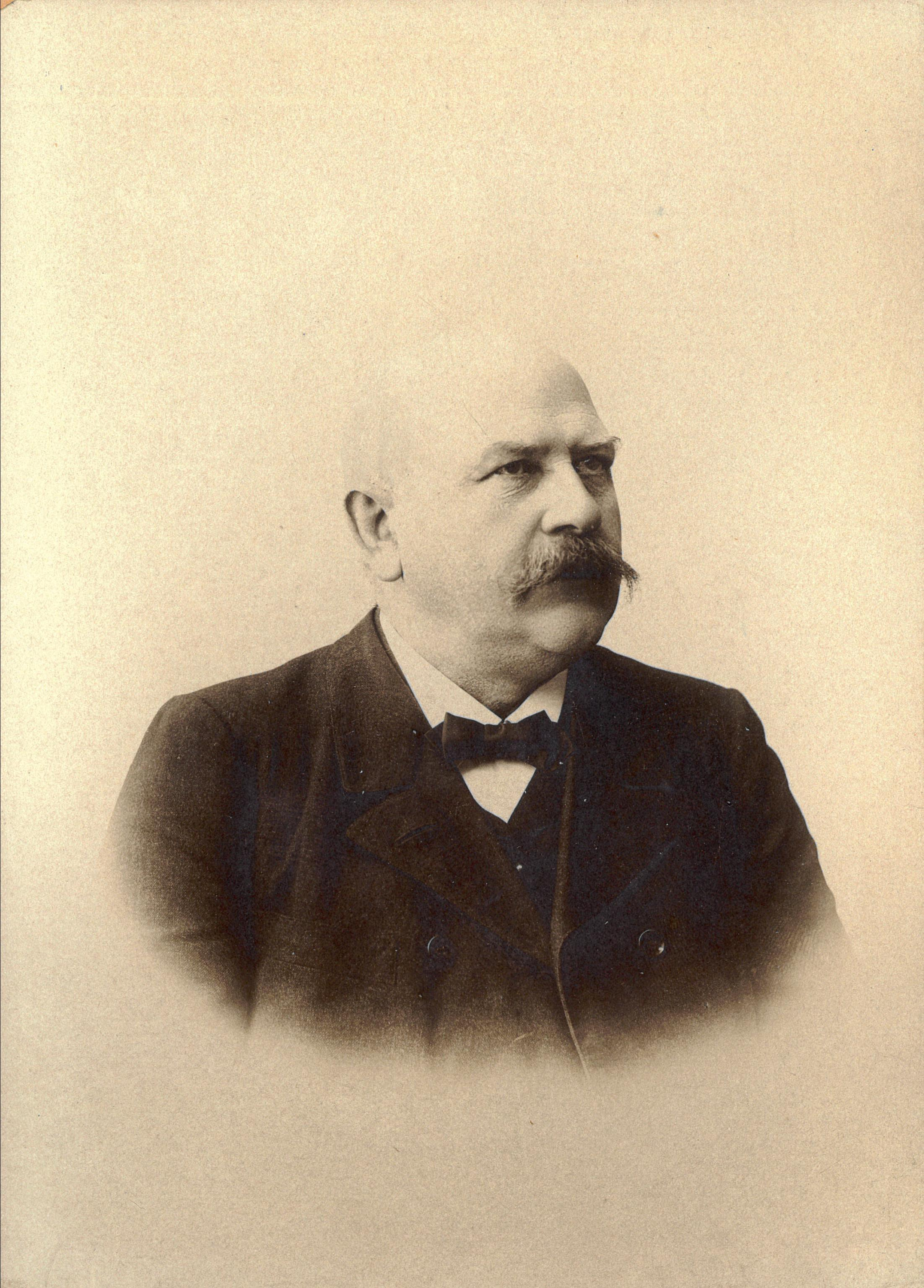 Otto Bøgh.